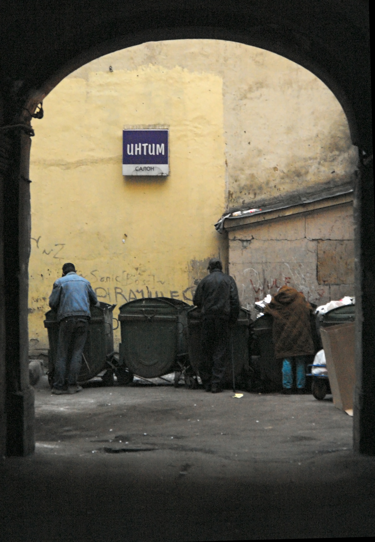 Копающиеся в мусорнике бомжи возле интим-салона.